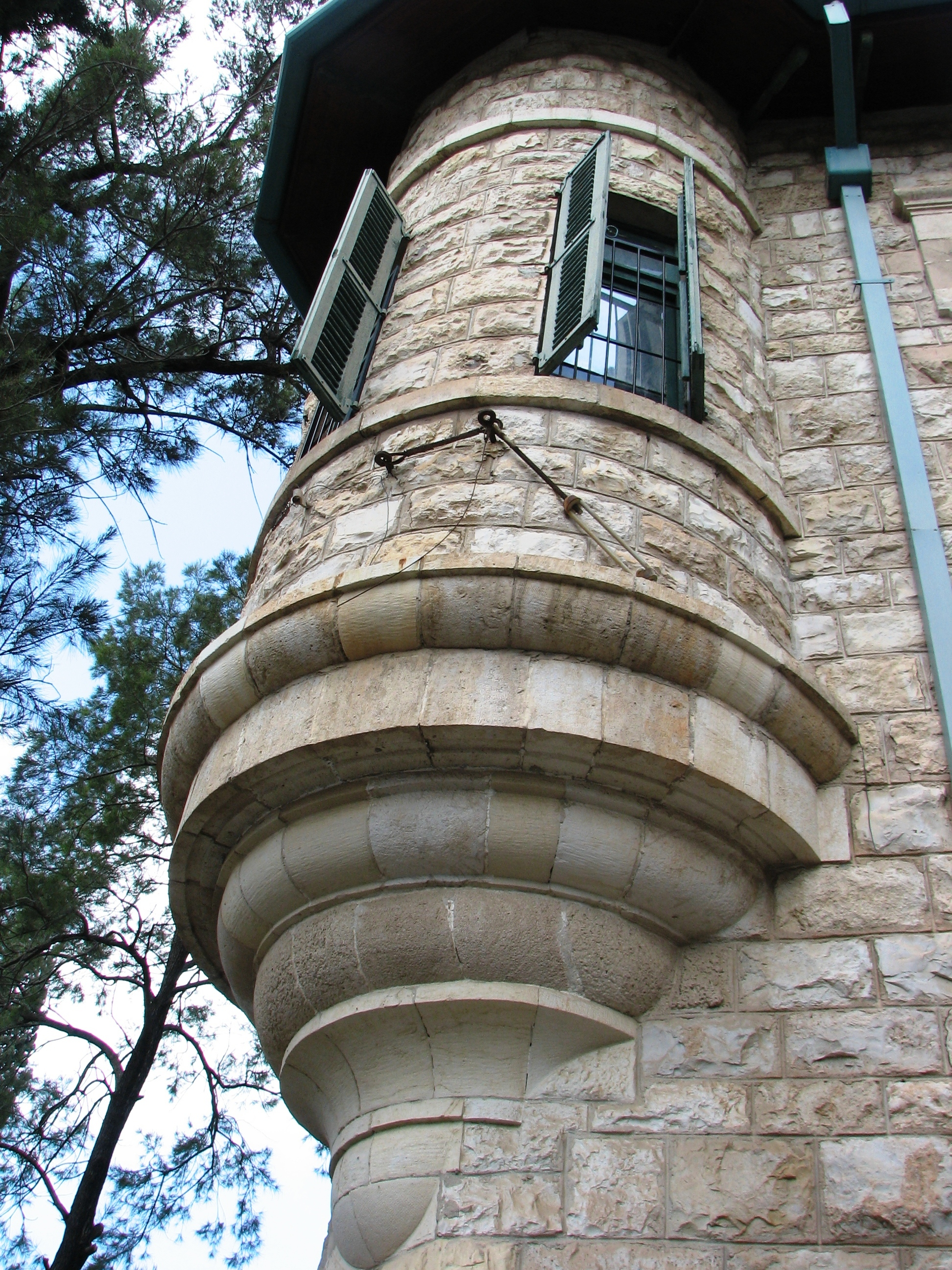 House of Yehuda Eitinת Hadar, Haifa Israel בית יהודה איתין, נבנה בשנים 1920-1919 . האדריכל היה גדליהו ווילושביץ, בין השנים 1922 ועד 1942 שימש כבית חולים הדסה ולאחריו בית חולים רוטשילד. הבית שוכן ברחוב שמריהו לוין 30, בשכונה ההיסטורית הטכניקום שנבנתה ליד הטכניון